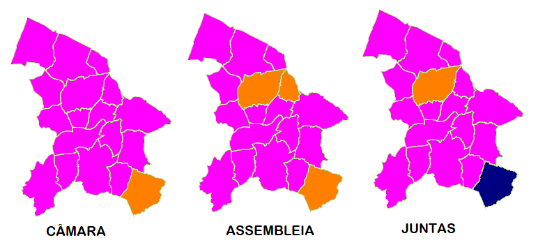 Mapa ilustrativo do partido mais votado por freguesia em Leiria (2017)